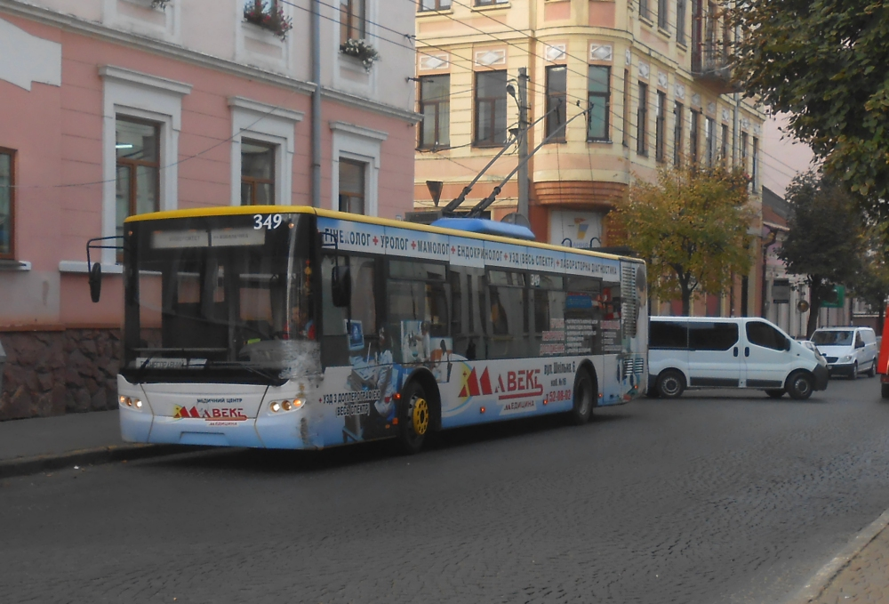 ЛАЗ E183D1 №349 на вул.Університетській після аварії 4.09.2013, Чернівці